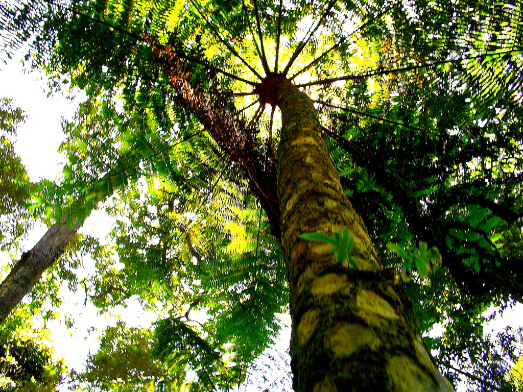 xaxim